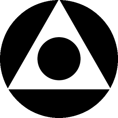 Ícono identificatorio del equipo argentino de carreras de Turismo Carretera, de los Hermanos Dante y Torcuato Emiliozzi, de los años '60.